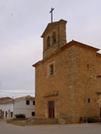 Rubielosbajos